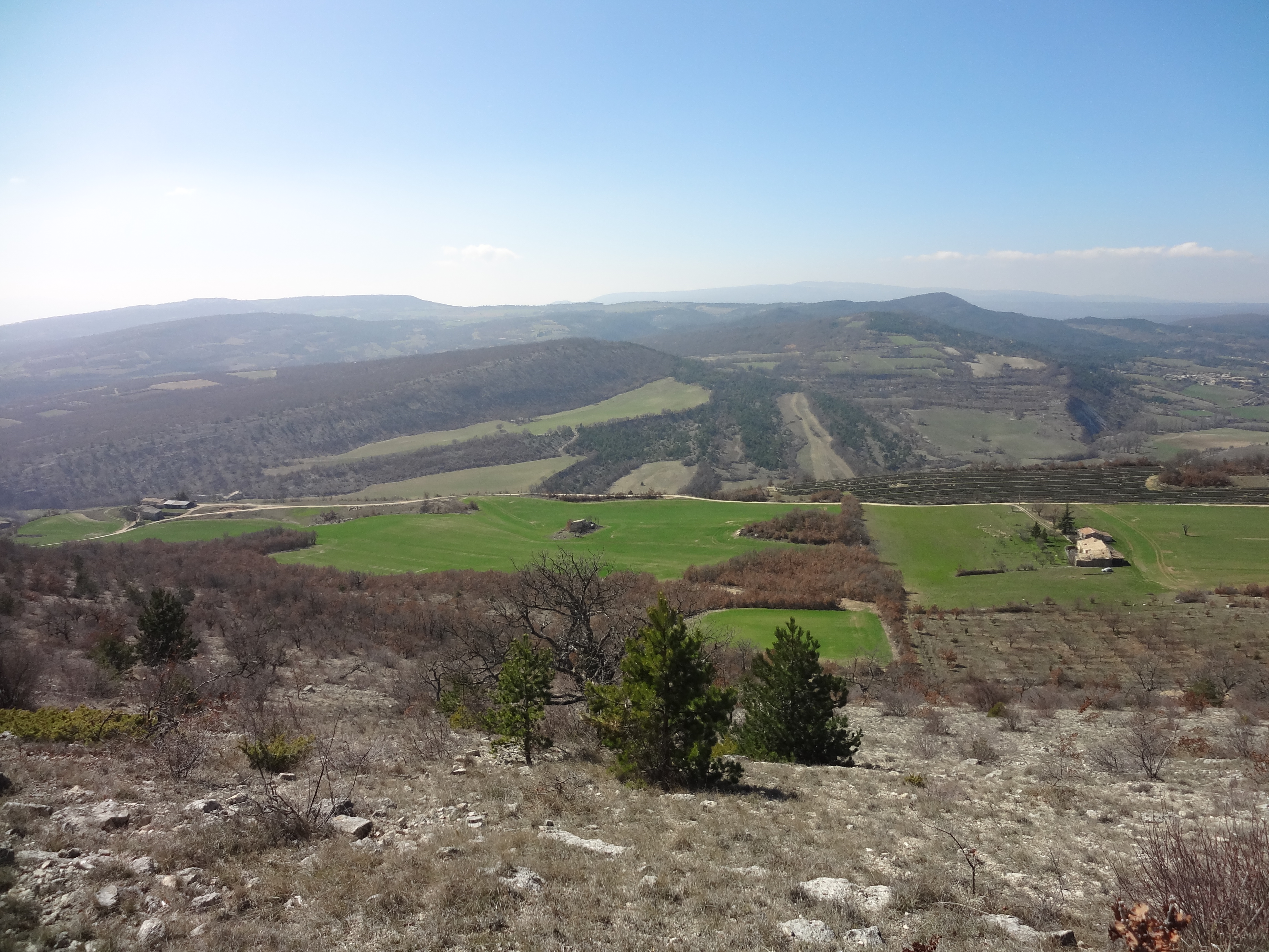 Coueste de May (le talus en face), vu des Hautes-Plaines, à Mane. Le vallon et la côte sont situées sur la commune du Revest-des-Brousses